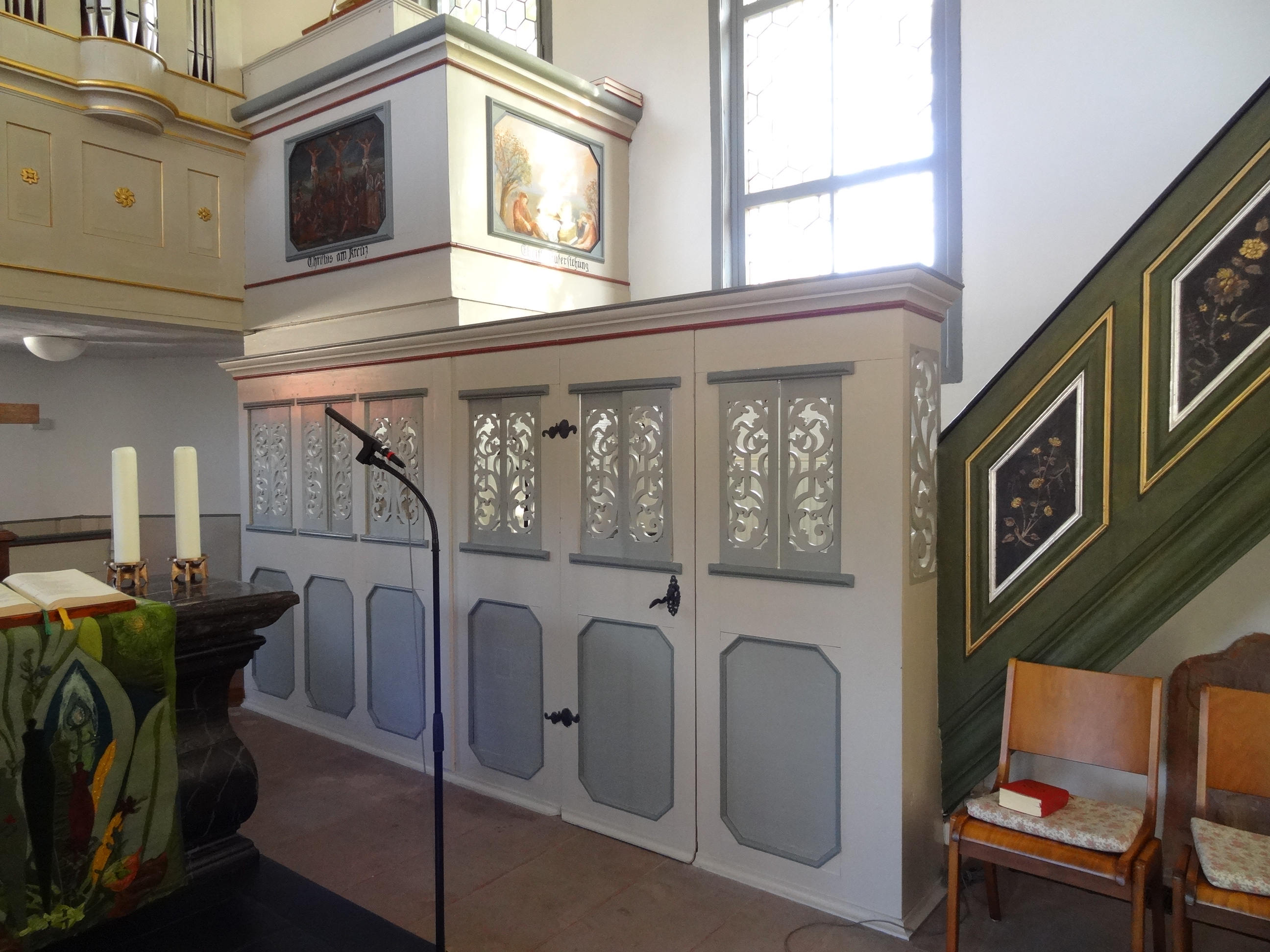 Evangelische Pfarrkirche Ebersgöns